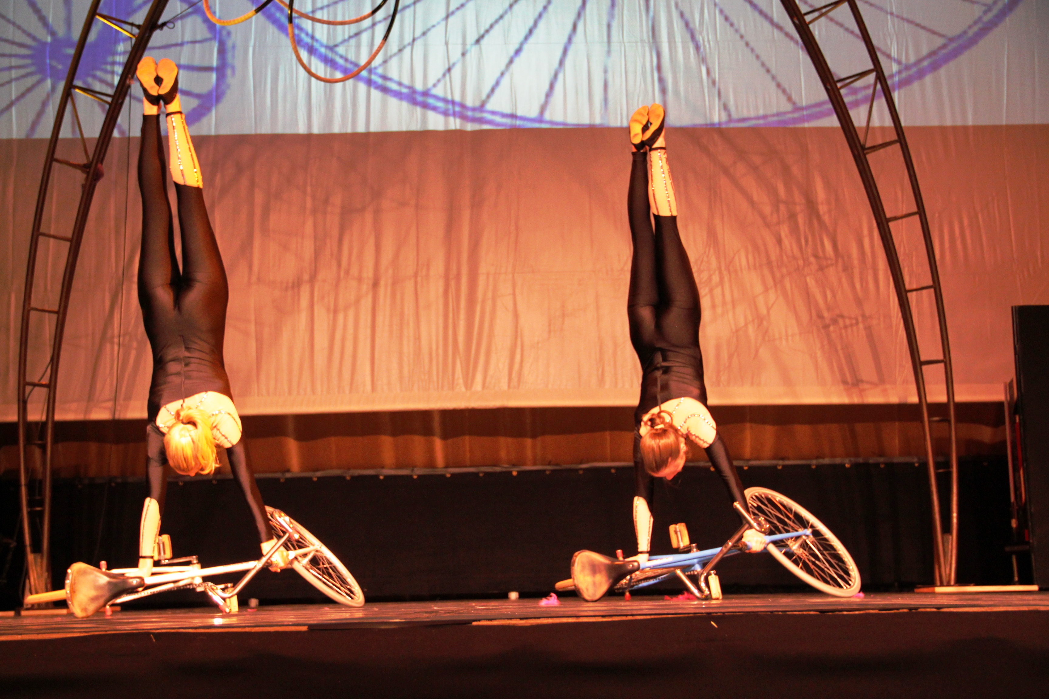 Katrin Schultheis und Sandra Sprinkmeier bei einer Show in Dijon/Frankreich